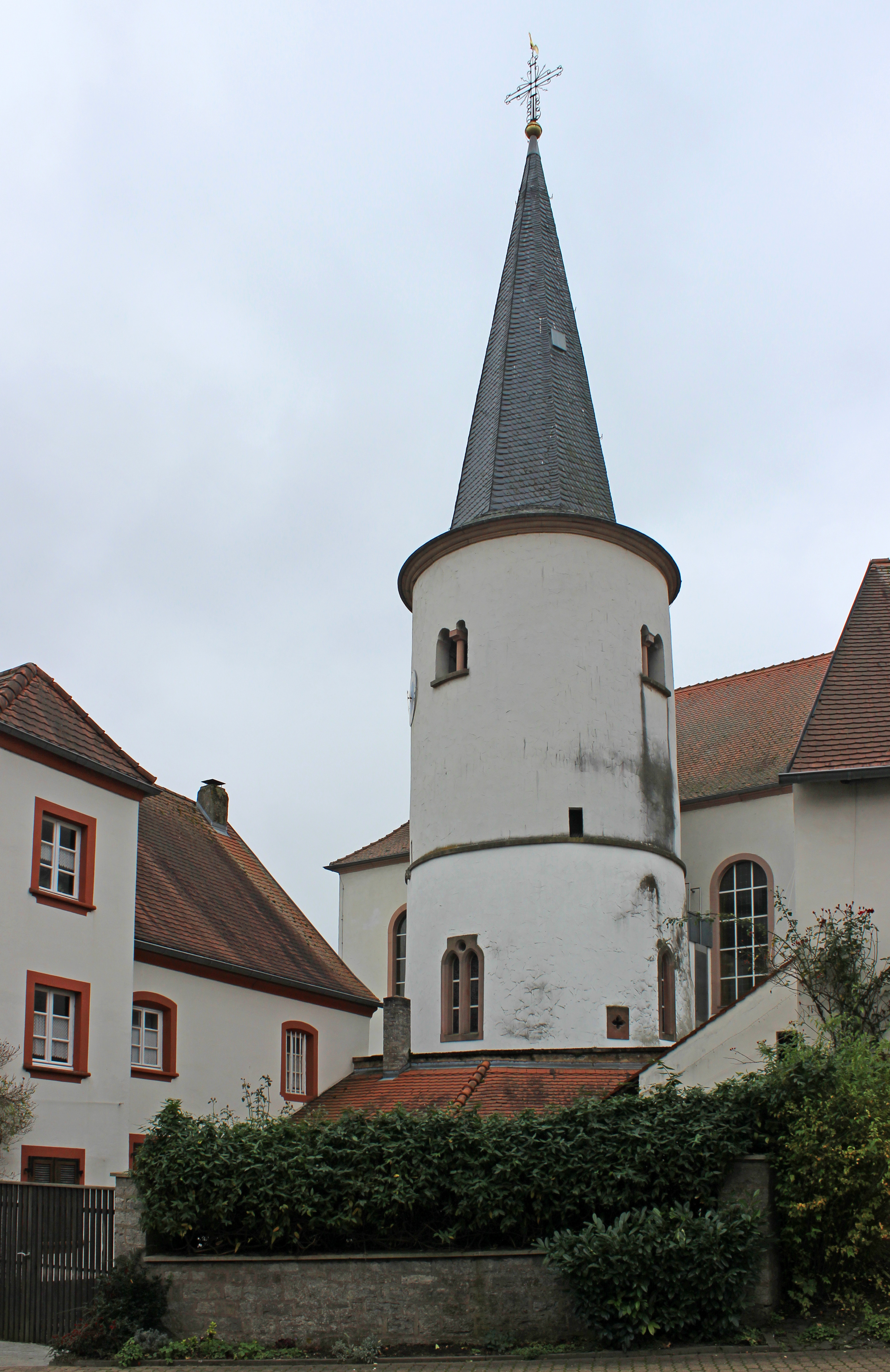 Reinheim, Gemeinde Gersheim, Saarpfalz-Kreis, Saarland - Katholische Pfarrkirche St. Markus